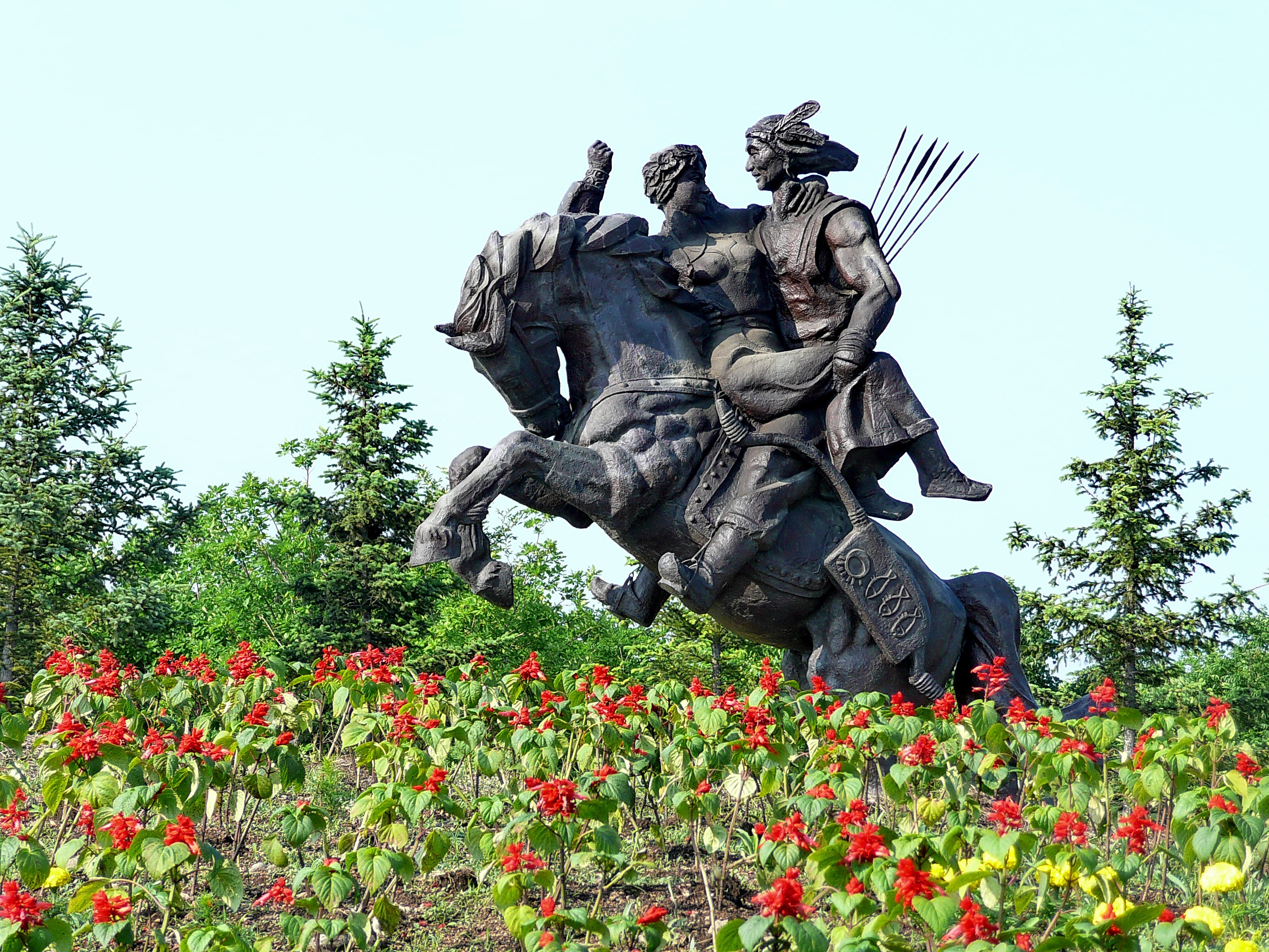 Bride KidnapIng 搶婚